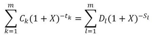 Gada procentu likmes aprēķins